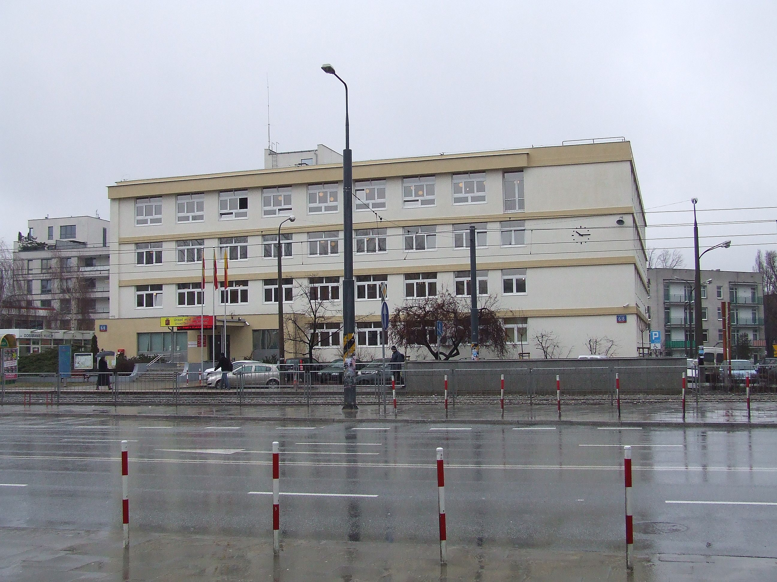 Ratusz dzielnicy Żoliborz